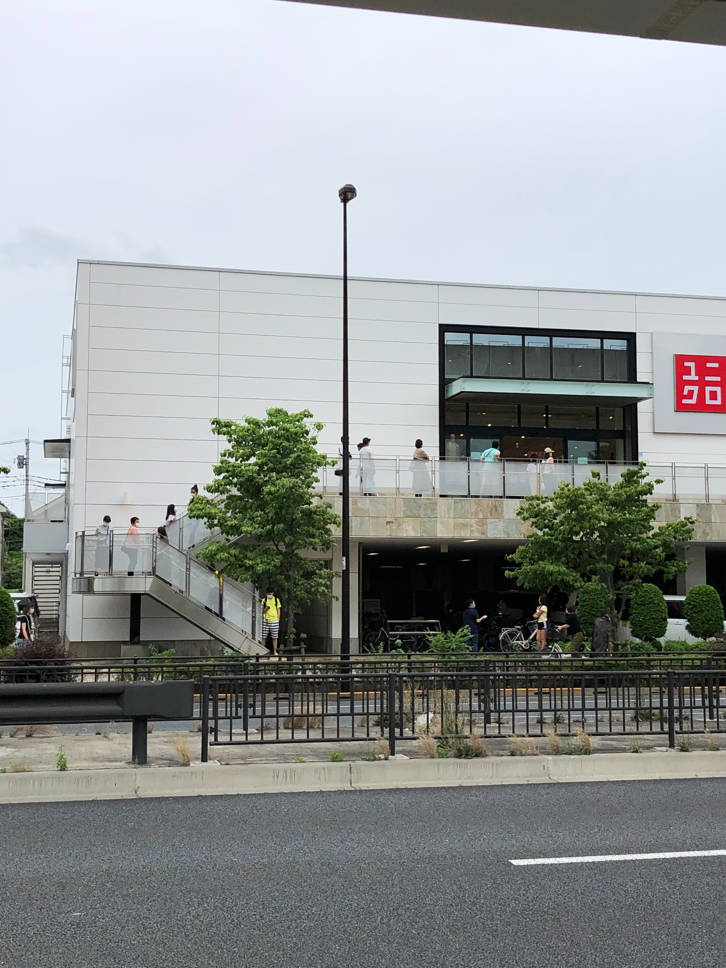 ソーシャルディスタンスを保って並ぶ人々